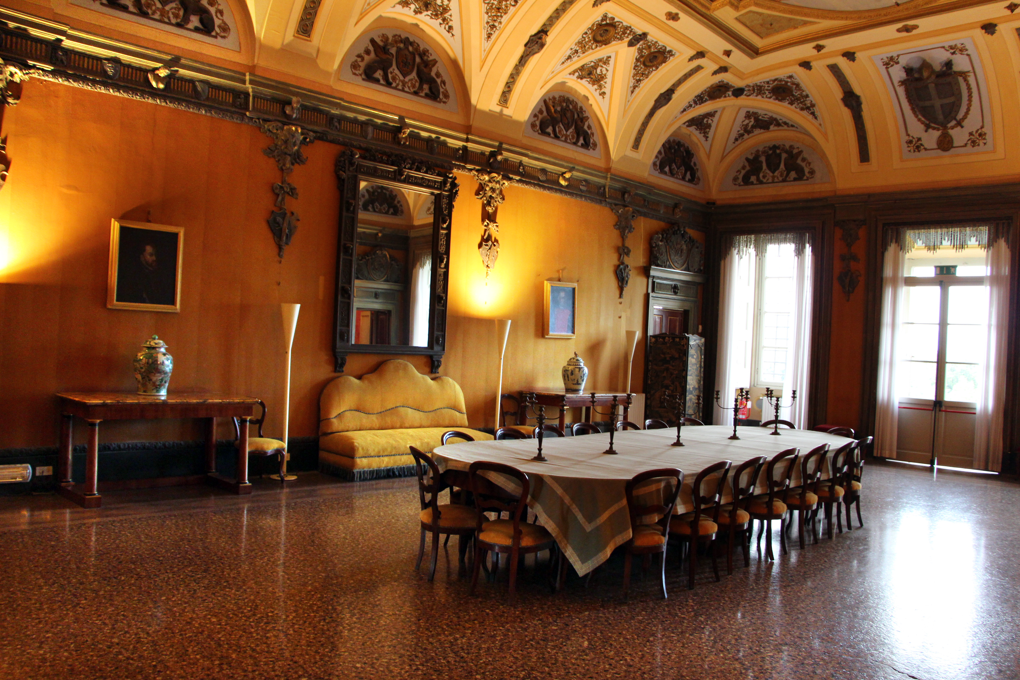 Villa medicea di Poggio a Caiano - MIBAC The making of this document was supported by Wikimedia CH. (Submit your project!) For all the files concerned, please see the category Supported by Wikimedia CH. This is a photo of a monument which is part of cultural heritage of Italy.